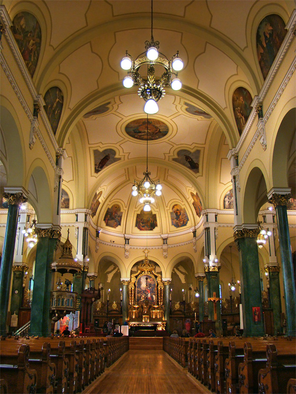 Cathédrale Saint-Charles-Borromée, Joliette, Lanaudière, Québec, Canada.